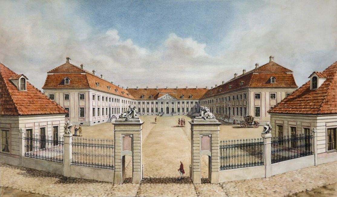 Беларуская (тарашкевіца): Новы замак у Горадні